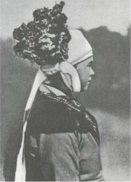 Ляхавіцкі строй. Вясельны ўбор маладой. 1905. Ляхавіцкі раён.